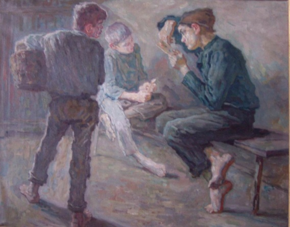 «Подмастерья, играющие в карты» (1915) Из коллекции Николаевского художественного музея имени Верещагина